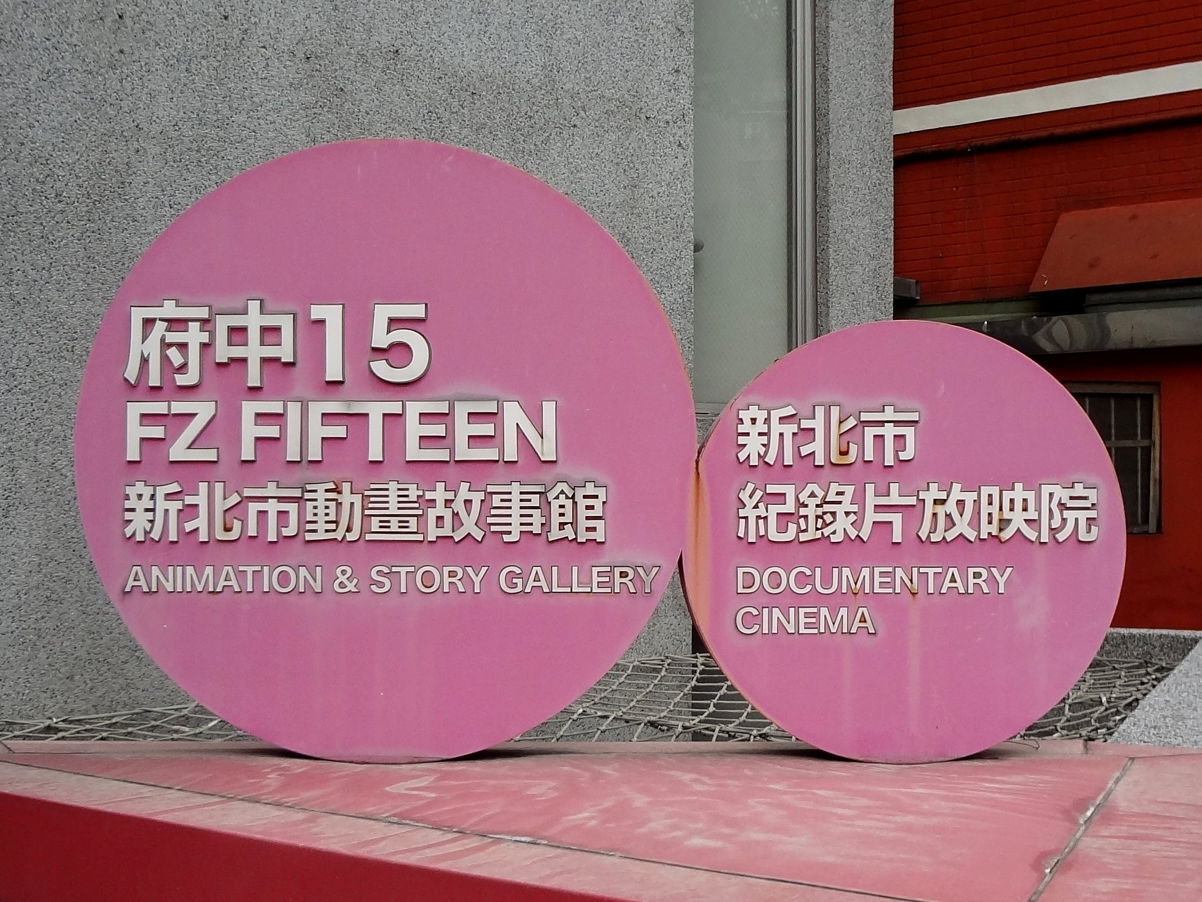 府中15大門外側，新北市動畫故事館與新北市紀錄片放映院標誌。